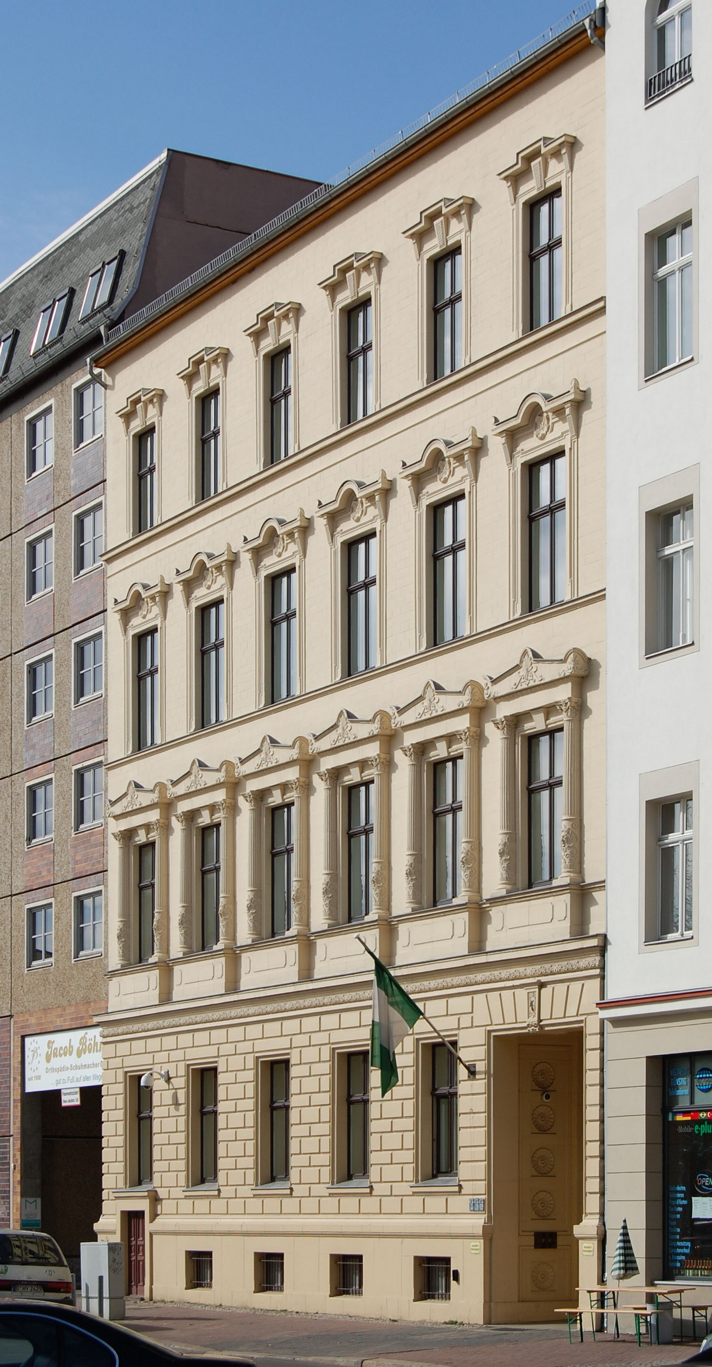 Nigerian Embassy in Berlin